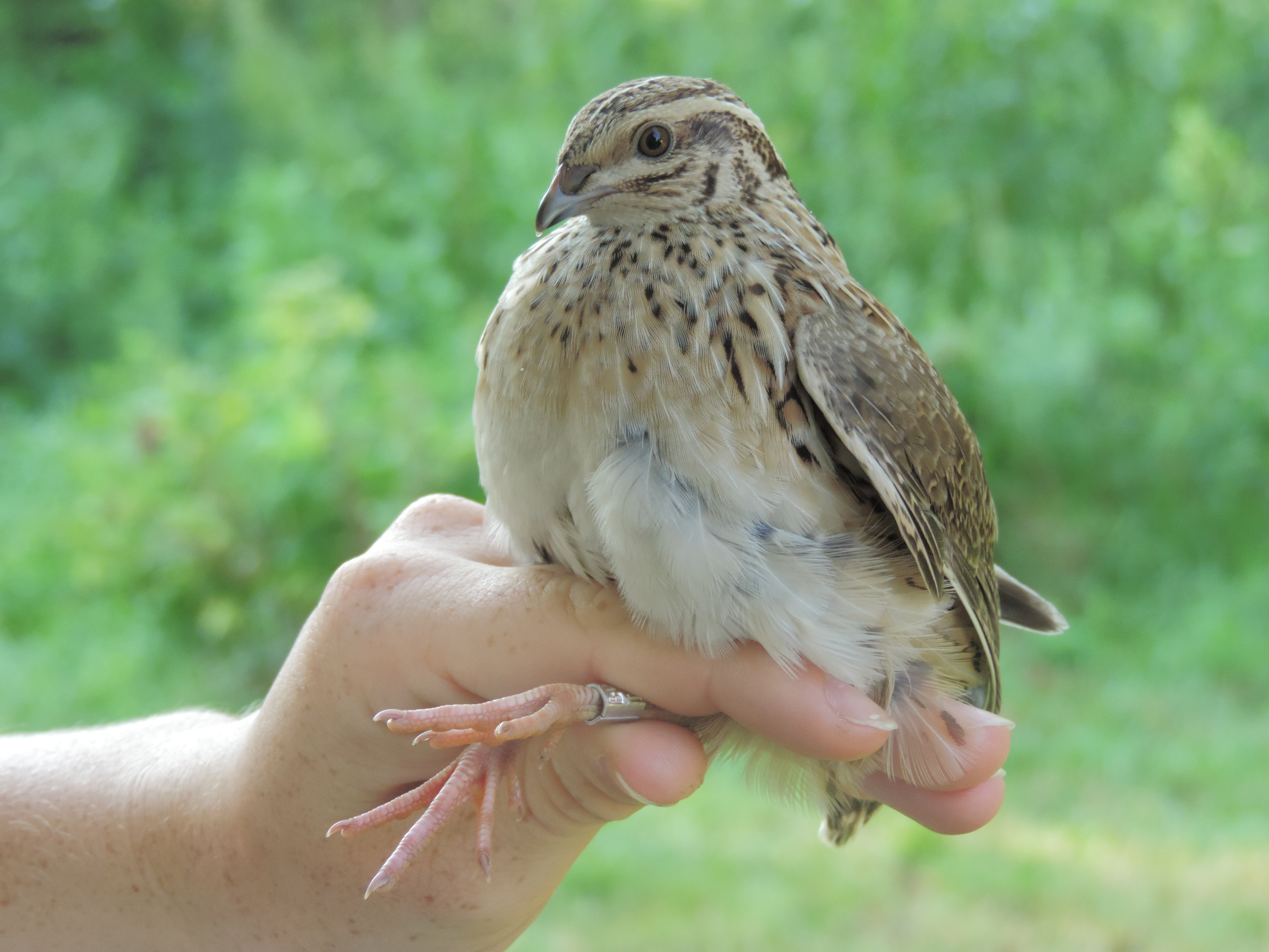 Prise à Ócsa, Hongrie